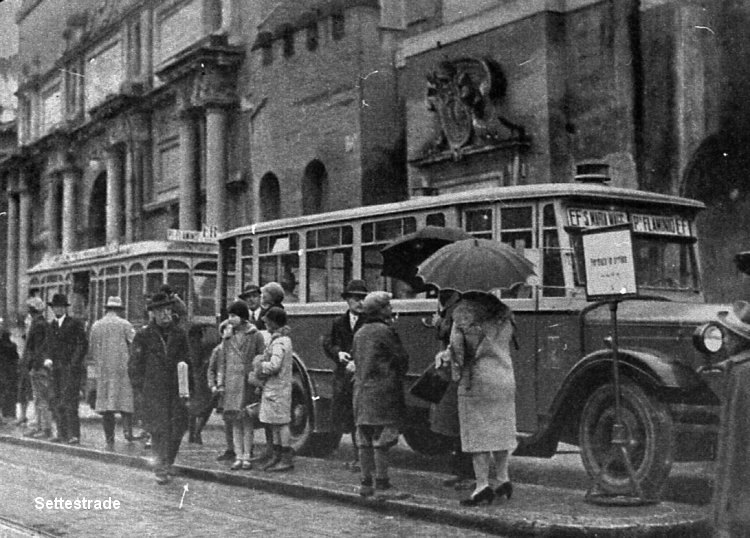 Autobus Lancia Omicron di Roma. Piazzale Flaminio (settembre 1930)